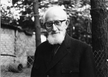 Edmund Löns, Ort: vermutlich Mettingen